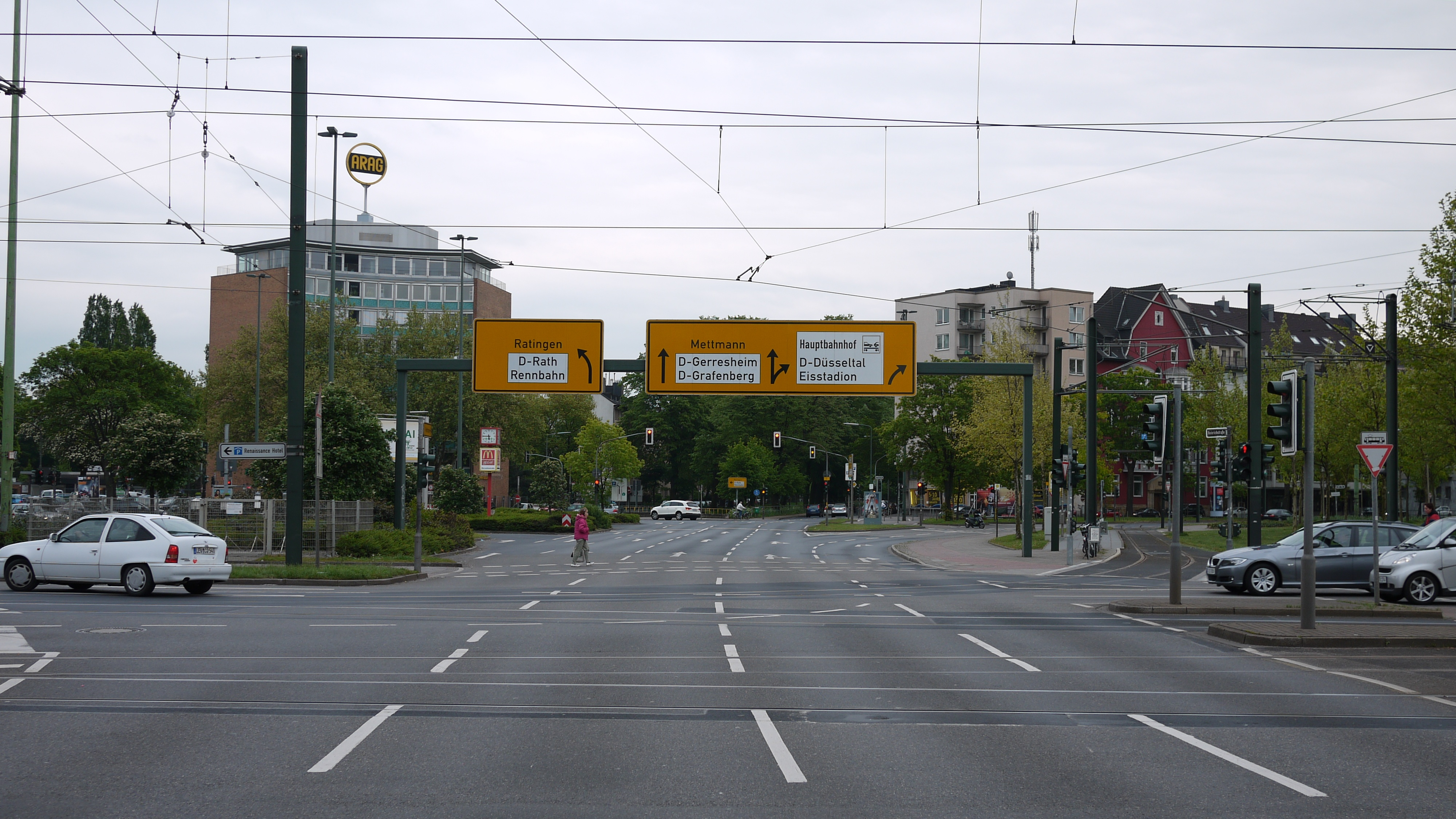 Mörsenbroicher Ei, Blick nach Südosten Richtung Heinrichstraße